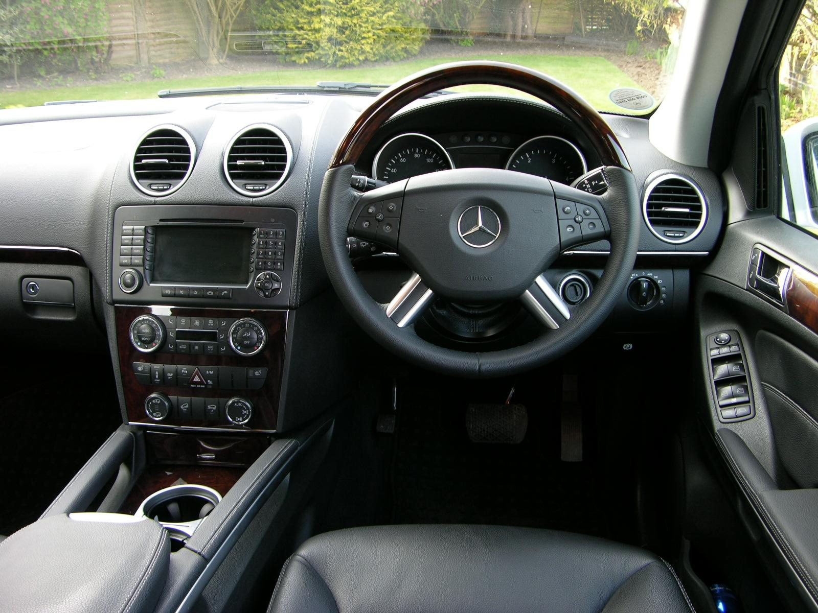 Mercedes Benz GL420 CDi 4-Matic